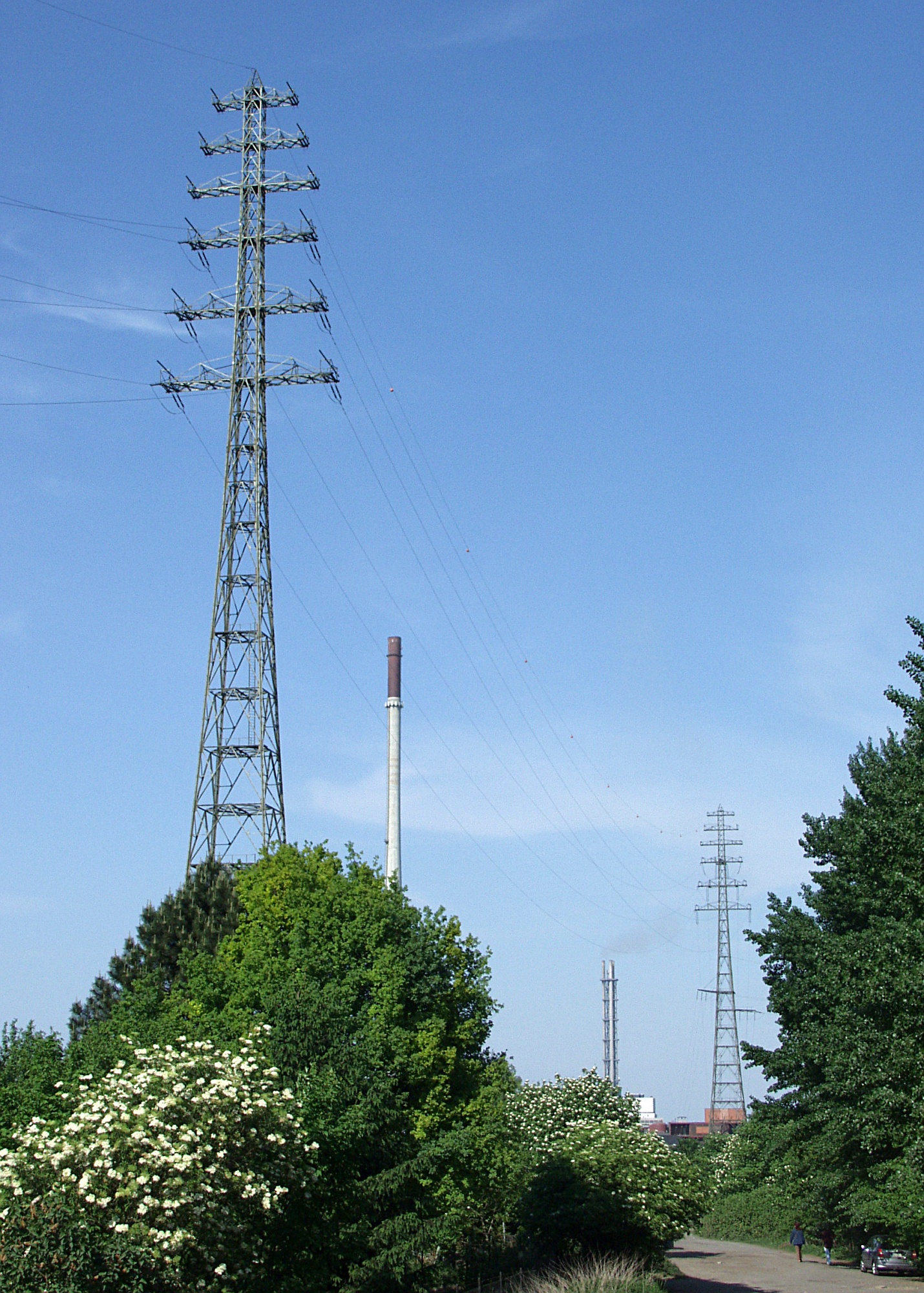 Freileitungskreuzung (110 kV, Bl. 2303) über den Rhein, Sicht von der linken auf die rechte Rheinseite